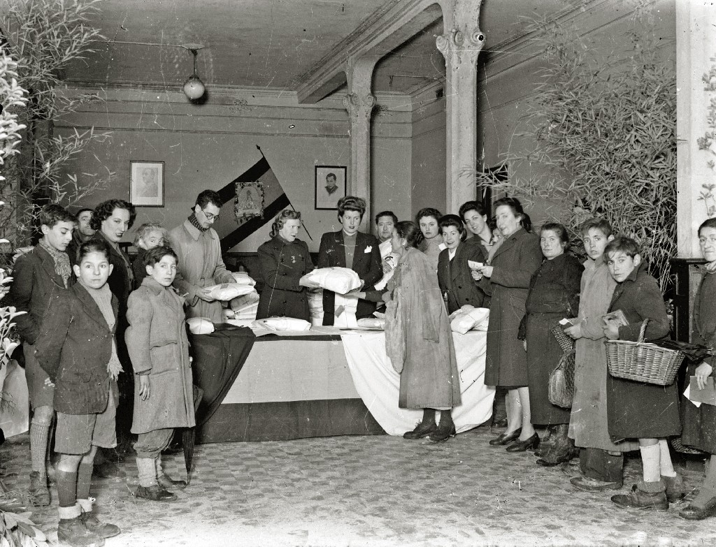 Título original: Reparto de lotes entre personas necesitadas (1/3) Localización: Guipúzcoa